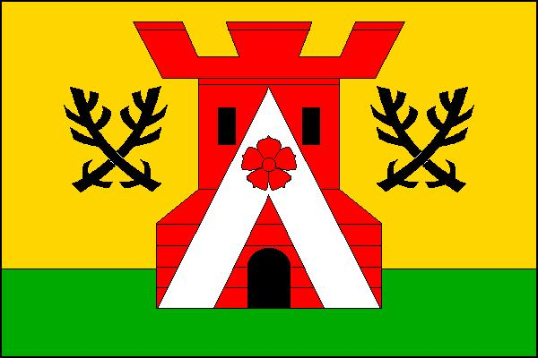 Vlajka obce Střemy